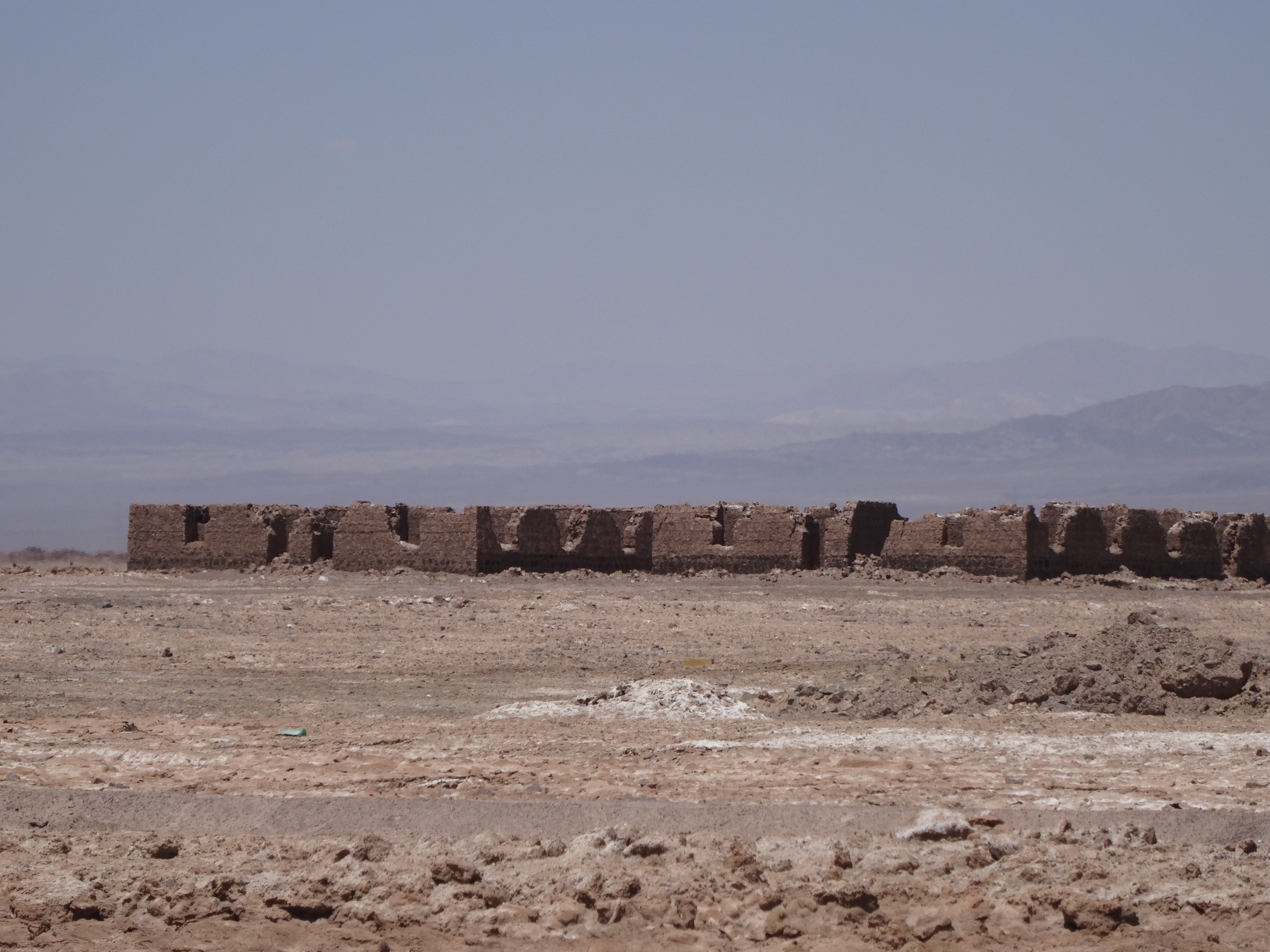 Fotografía de inquilinato perteneciente a una oficina salitrera en la pampa chilena